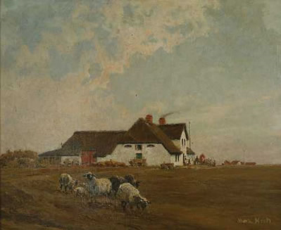 Ostfriesischer Hof